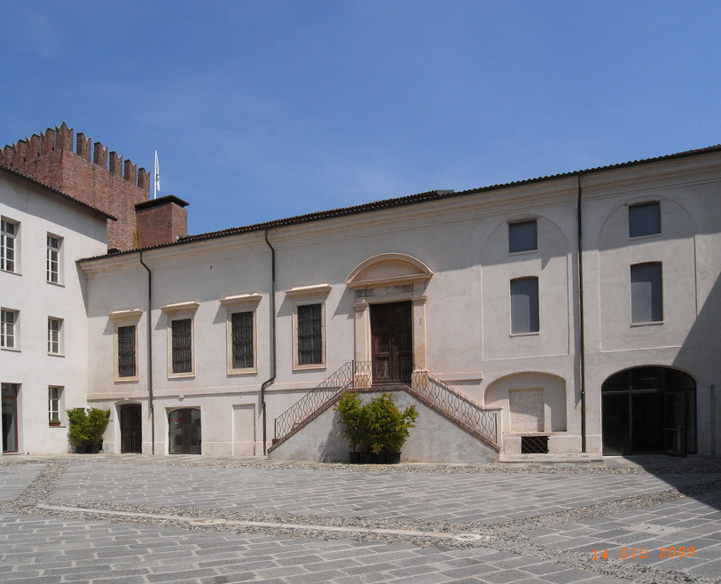 Vista interna del castello di Casale Monferrato.